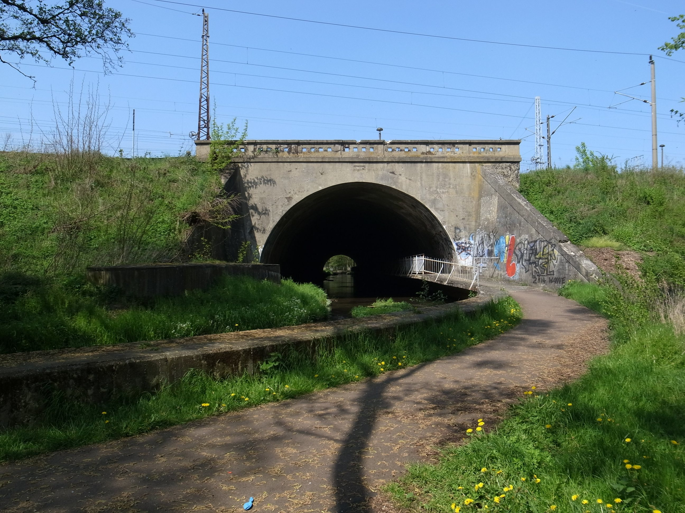 Roßlau, Rosseltunnel unter dem Güterbahnhof. An der Tunnelwand über der Rossel ist ein Fußweg der eine Unterquerung der Bahnanlagen ermöglicht. Die Länge beträgt ca. 130 m.